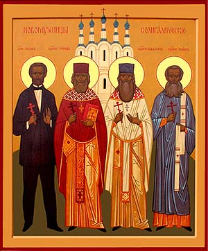 Новомученики Солигалича, икона, XXI век: Статский советник Иоанн Павлович Перебаскин Протоиерей Иосиф Сергеевич Смирнов Иерей Владимир Иоаннович Ильинский Диакон Иоанн Алексеевич Касторский